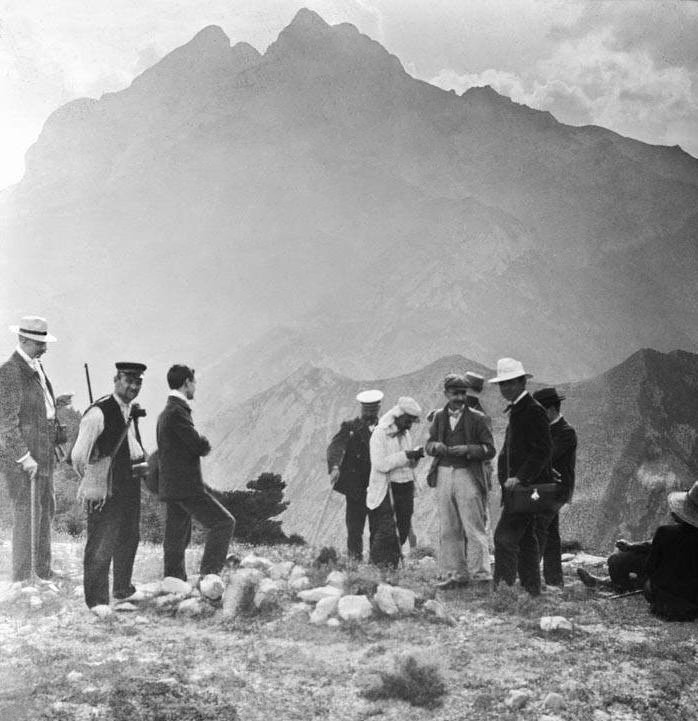 Al coll de la Bena amb el Pedraforca al fons. Cèsar August Torras i Ferreri (ca. 1905)